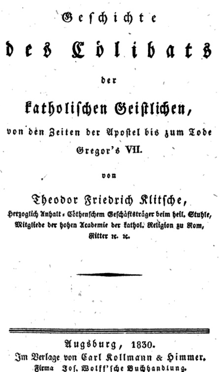 Theodor Friedrich Klitsche de la Grange (1799-1868), natürlicher Sohn des Prinzen Louis Ferdinand von Preußen, Buchtitelseite eines eigenen Werkes